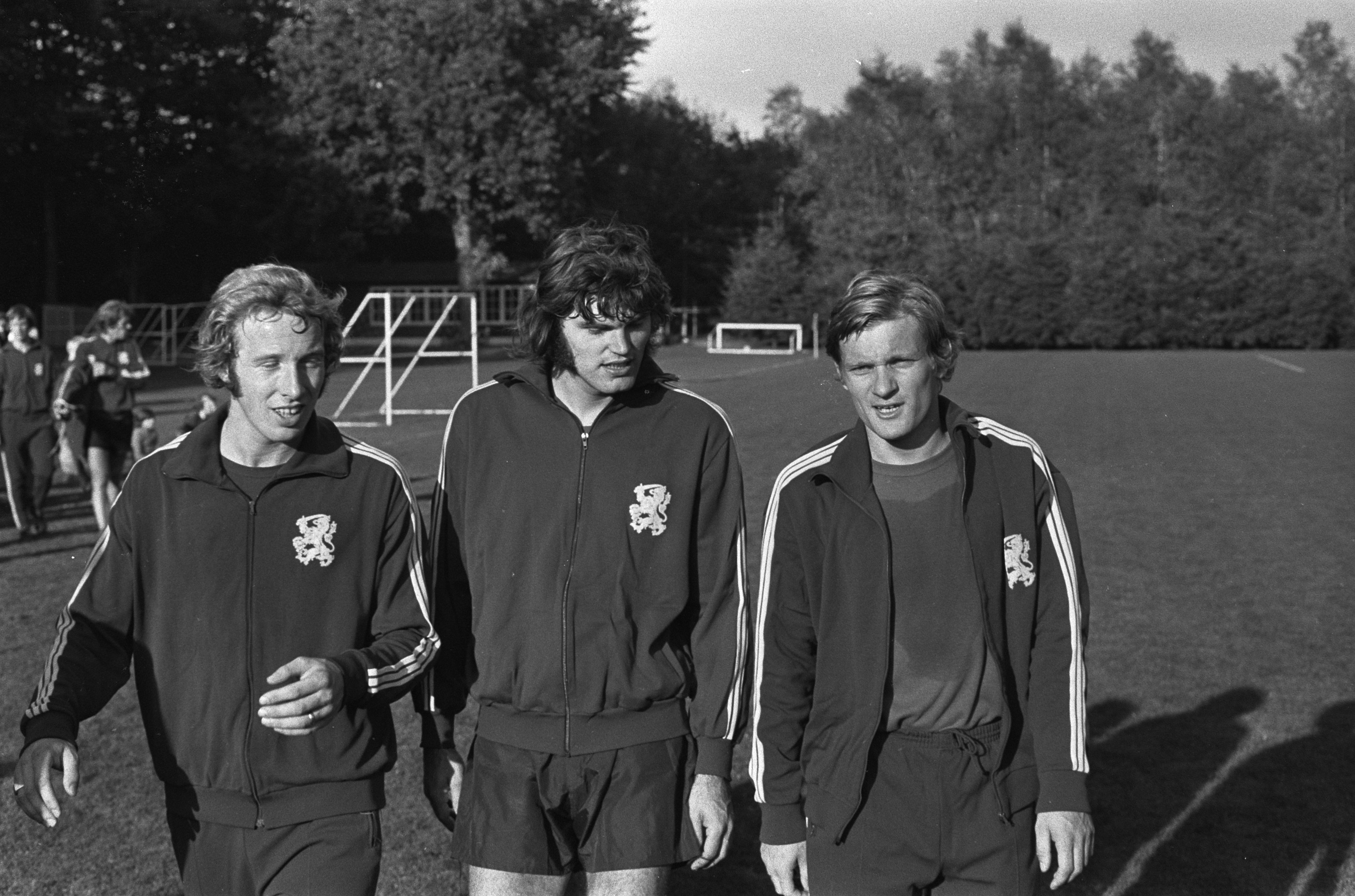 Entraînement de l'équipe néerlandaise pour le match contre la RDA à Zeist. De gauche à droite, les débutants Jan Jeuring, B. Hulshoff et H. Venneker. Photographie par Joost Evers / Anefo.